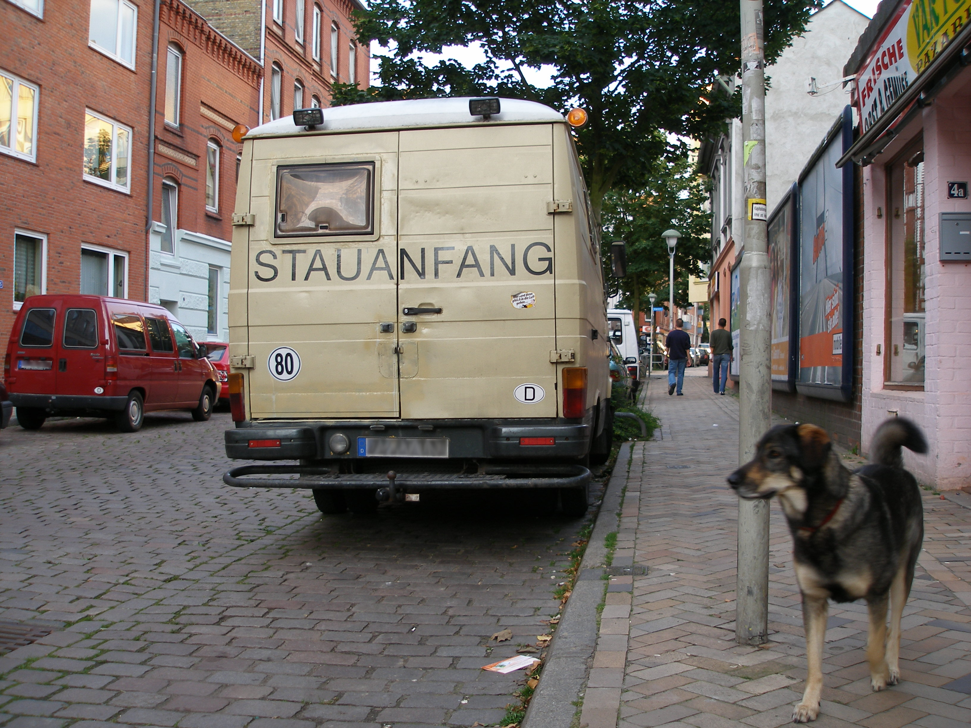 Selbst erstelltes Foto - svenne - Blick in die Medusastrasse nahe dem Vinetaplatz